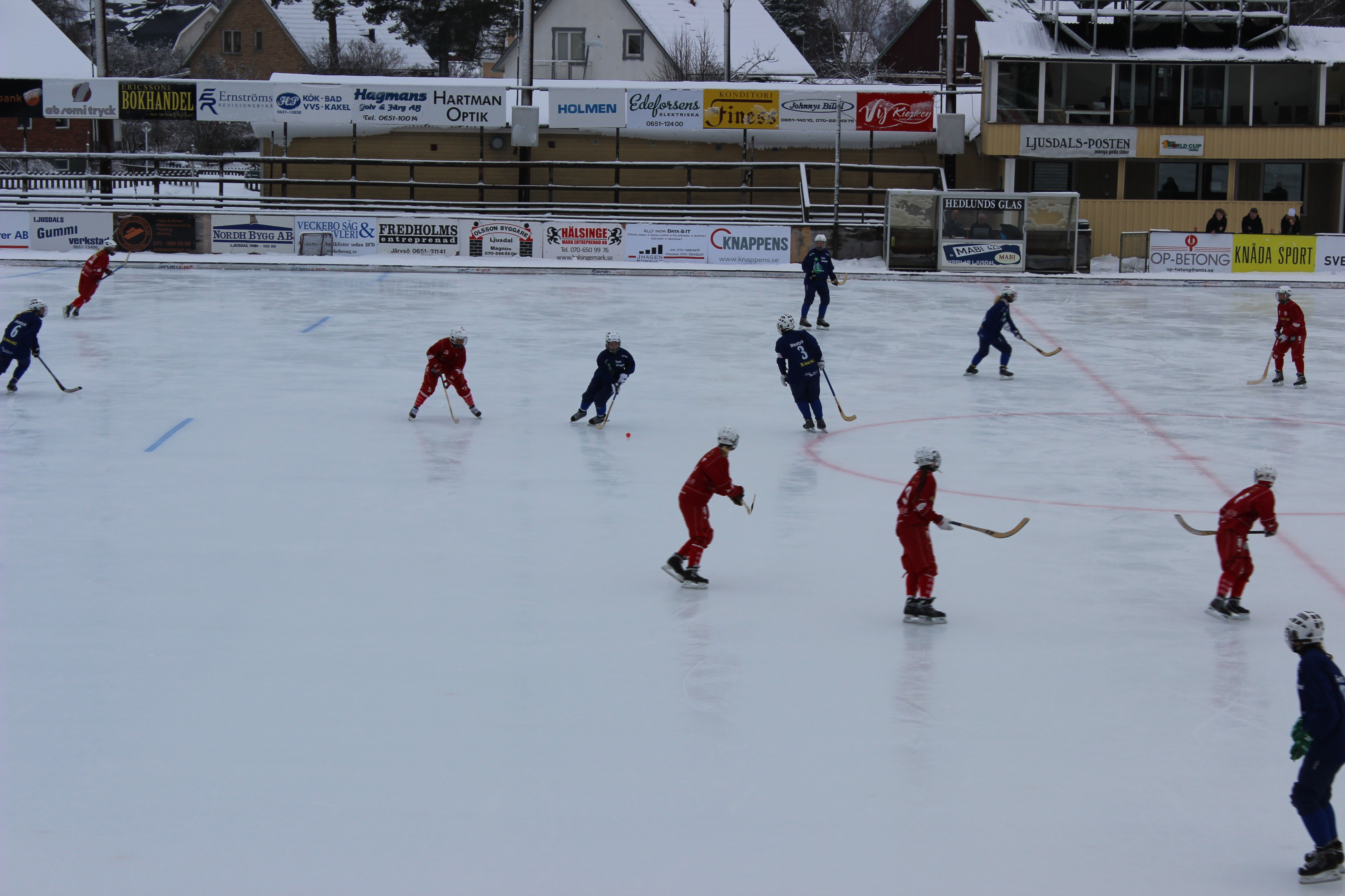 Team Hälsingland möter Härnösand på IP i Ljusdal